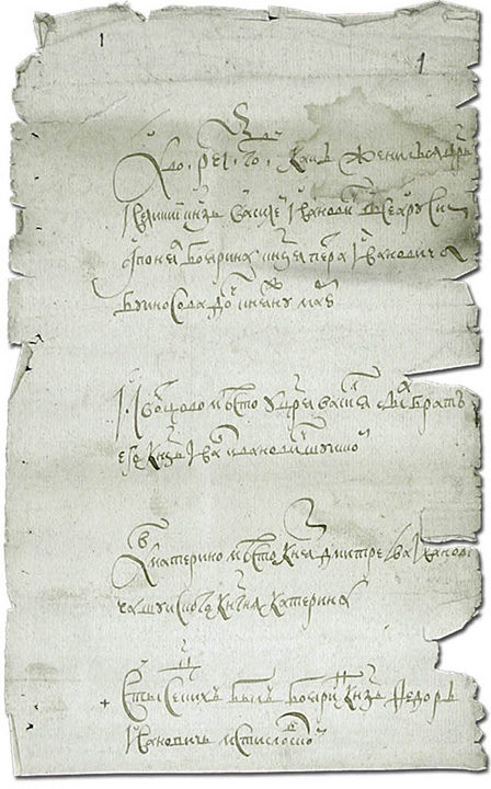 Чиновный список свадьбы царя Василия Ивановича Шуйского с княжной Марьей Петровной Буйносовой-Ростовской